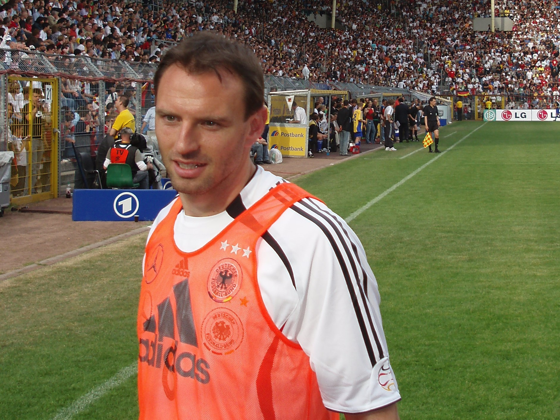 Jens Nowotny Ort: Mannheim # Testspiel der deutschen Nationalmannschaft gegen den Verbandsligisten FSV Luckenwalde